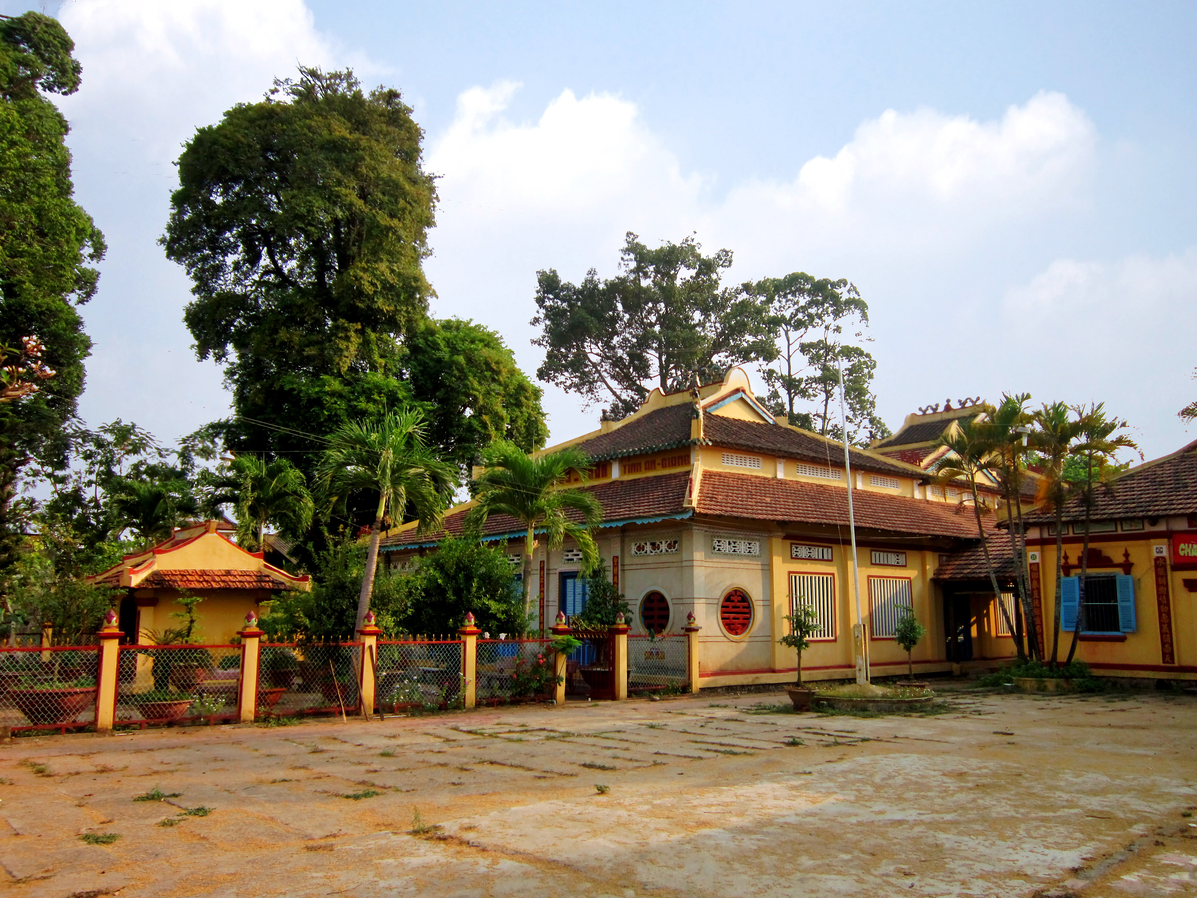 Đình thần Bình Thủy ở xã Bình Thủy, thuộc huyện Châu Phú, tỉnh An Giang, Việt Nam.